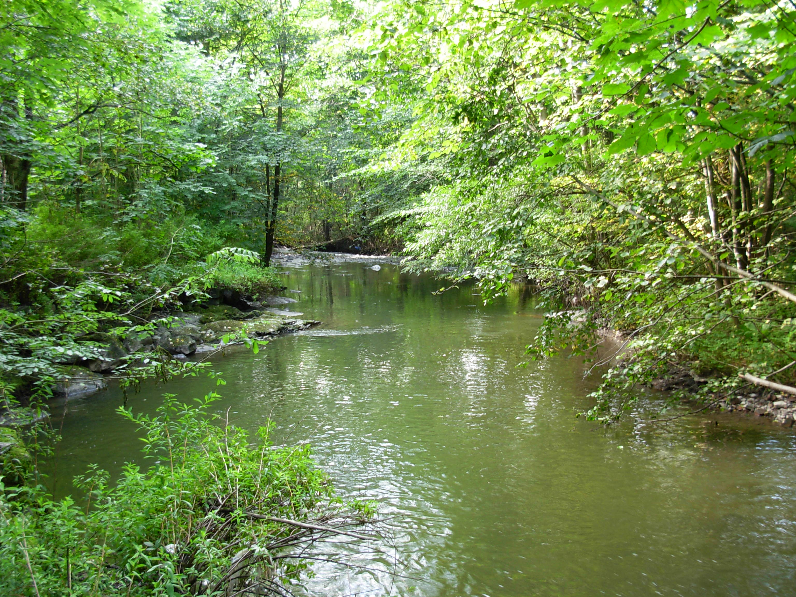 Alnaelva i Svartdalen, ovenfor Kværner